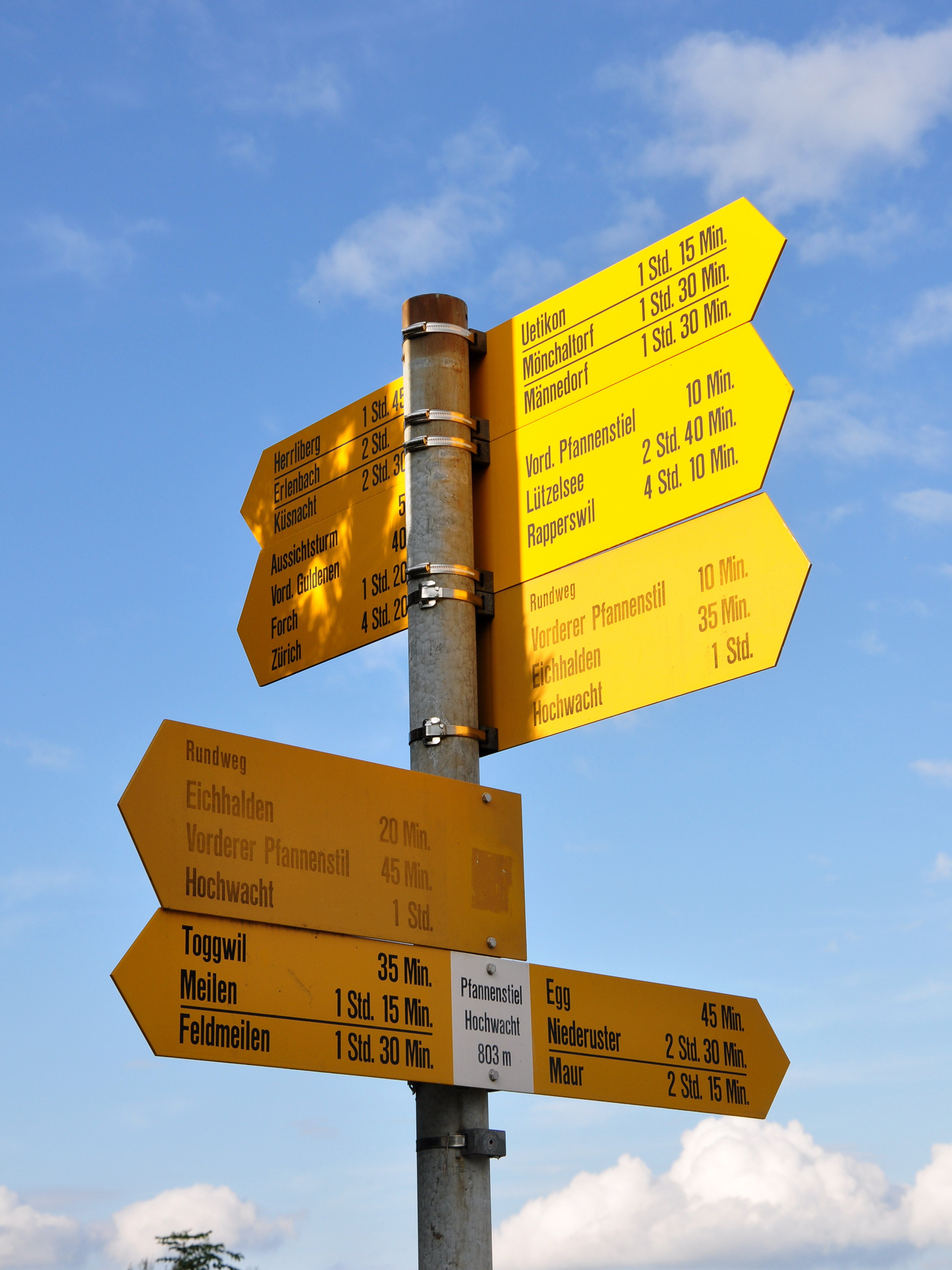 On Pfannenstiel Hochwacht (Switzerland)